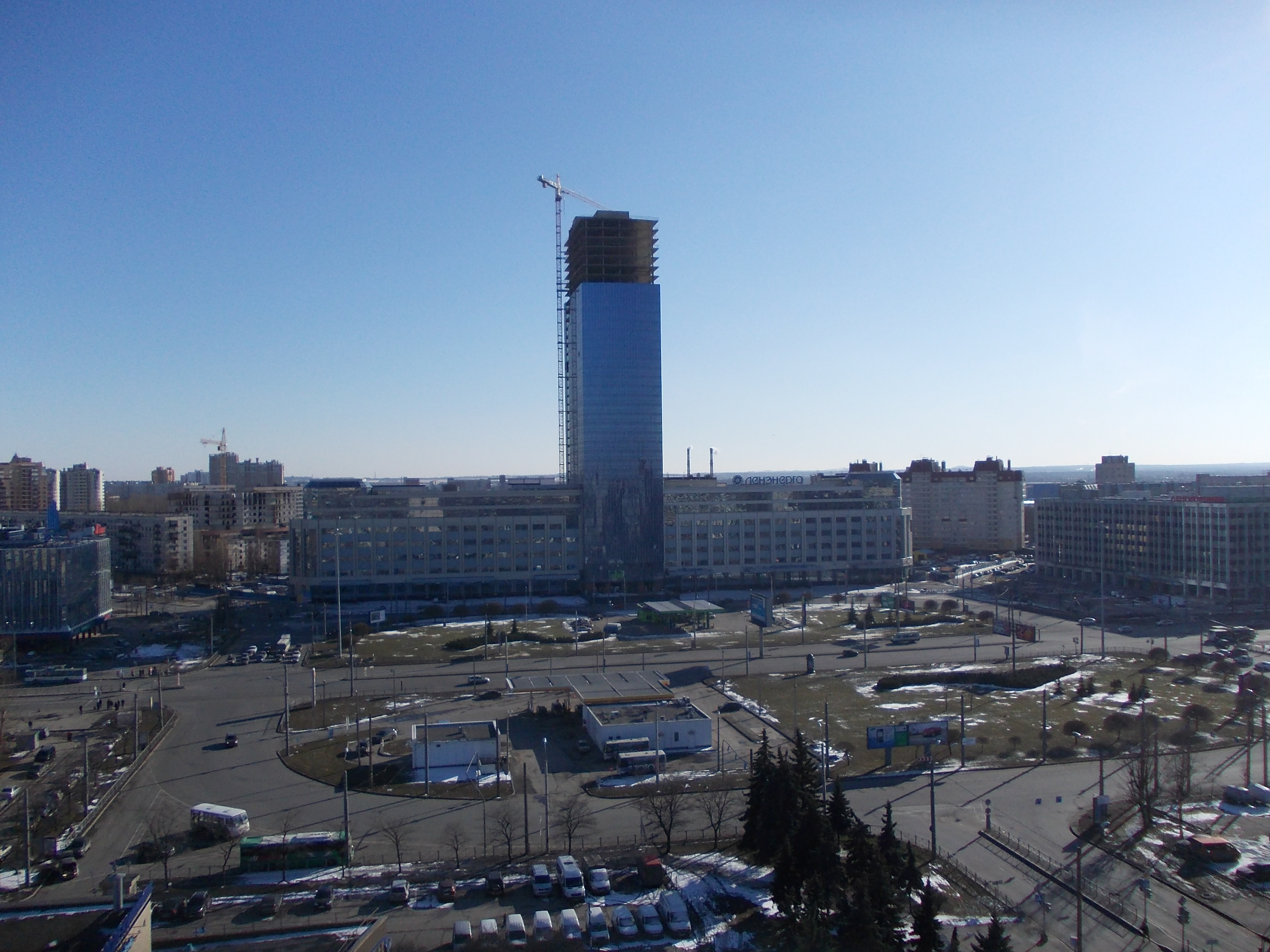 Лидер-тауэр в процессе строительства.